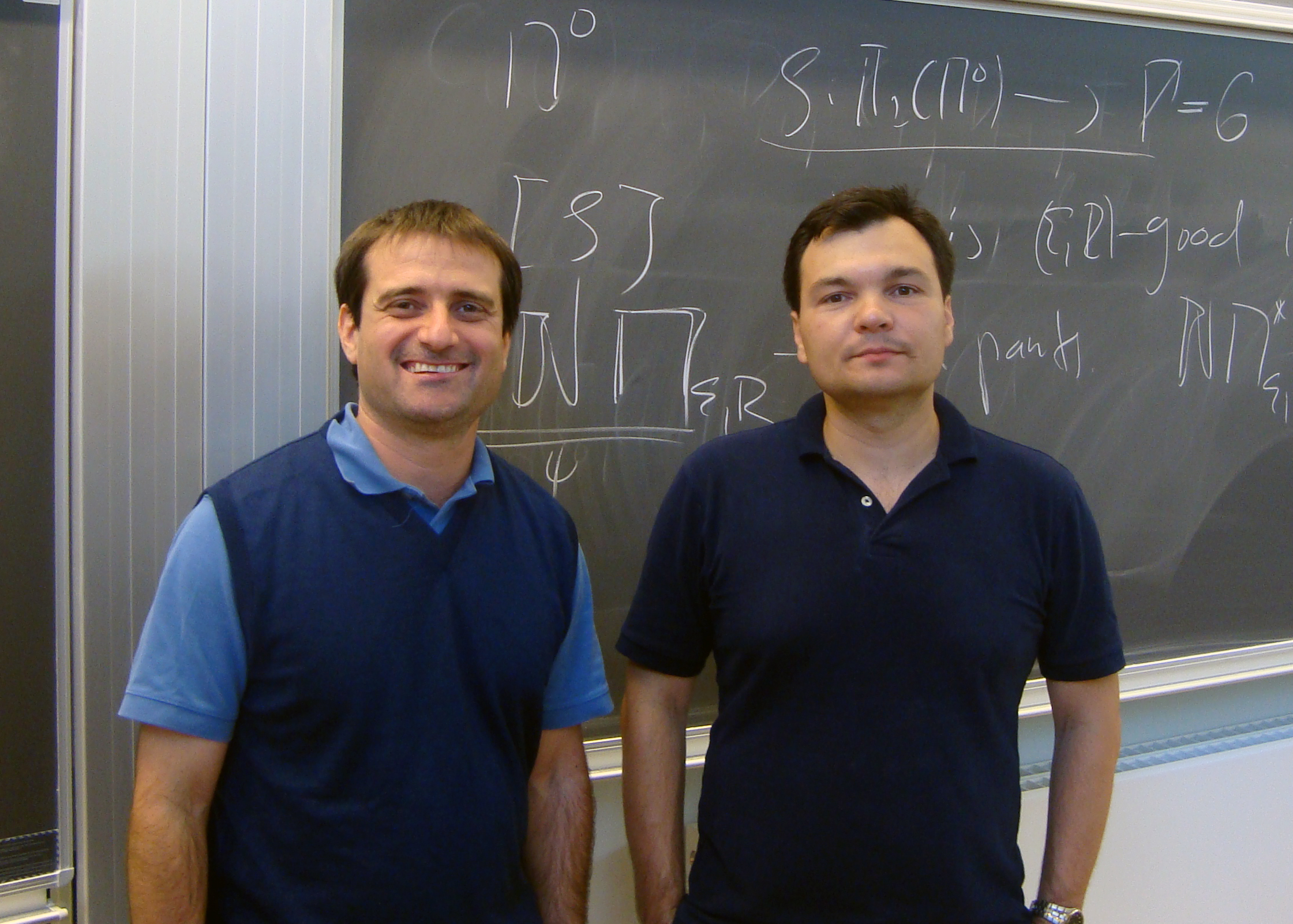 Matematikerne Jeremy Kahn and Vladimir Markovic under mesterklassen The Ehrenpreis conjecture i Aarhus, august 2012.